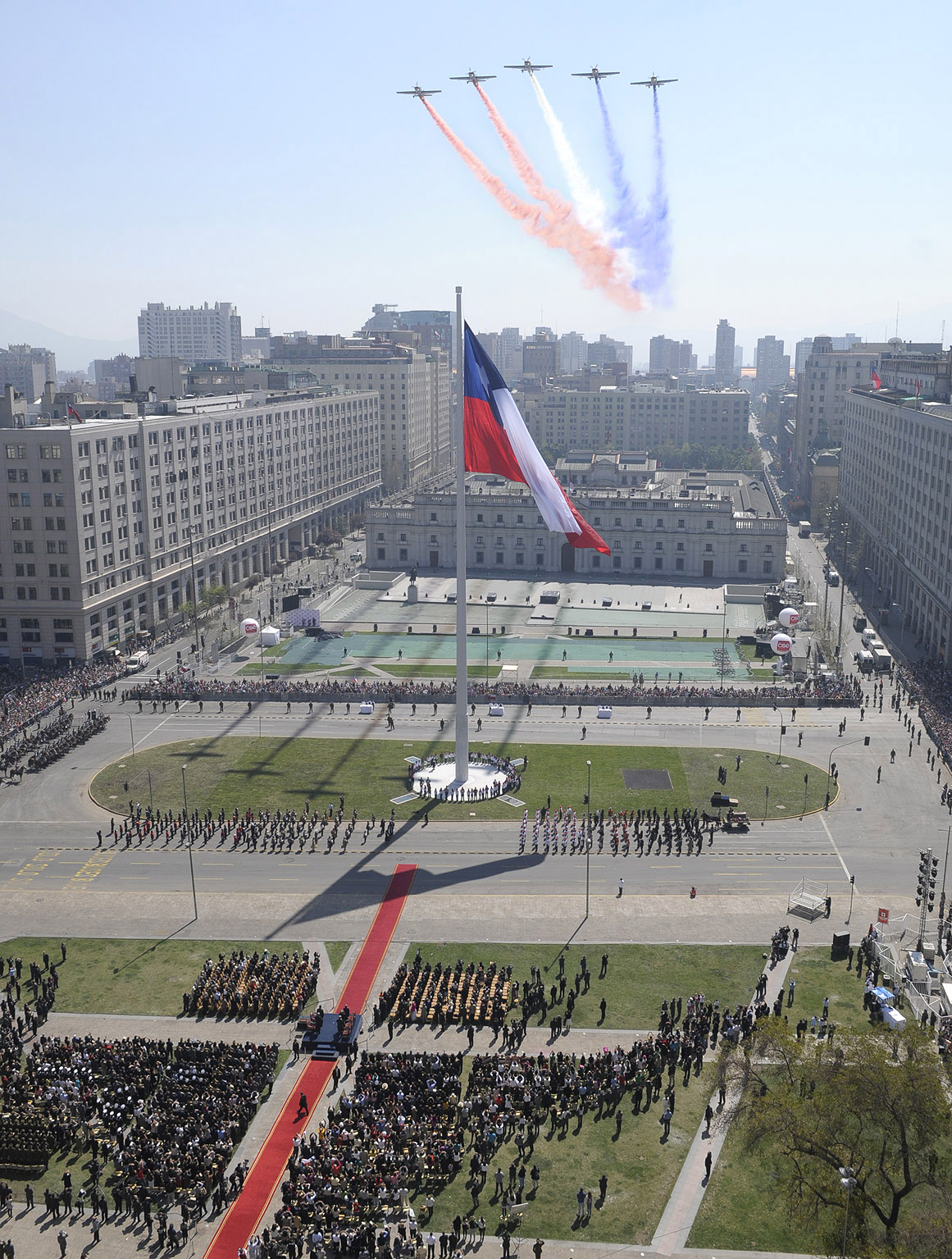 En la intersección de la Alameda con el Paseo Bulnes se realizó la ceremonia del izamiento de la Gran Bandera, que hoy flamea a más de 60 metros de altura. Este evento fue encabezado por el Presidente de la República, Sebastián Piñera, y estuvo marcado por la presencia de ministros, autoridades y los ex Mandatarios del país. Justo en el momento en que el pabellón patrio era izado, una formación de la escuadrilla acrobática de los Halcones de la Fach sobrevolaba el lugar dejando una estela de humo tricolor. Luego de este simbólico acto, el Jefe de Estado recordó la importancia de la bandera a lo largo de nuestra historia e hizo una mención especial a las generaciones futuras. “Estamos trabajando para construir para ellos un Chile lleno de oportunidades, lleno de sonrisas, colores y alegría. Un Chile más libre, más grande y más fraterno. Un Chile con verdadera igualdad de oportunidades. Un Chile en que todos puedan luchar para cumplir sus sueños y alcanzar la felicidad, que es una tarea que está en el alma del destino y la misión de cada uno en este mundo”, señaló.